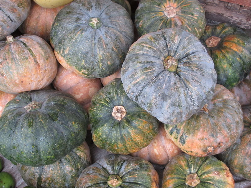 Bikol Central: Bunga nin kalabasa